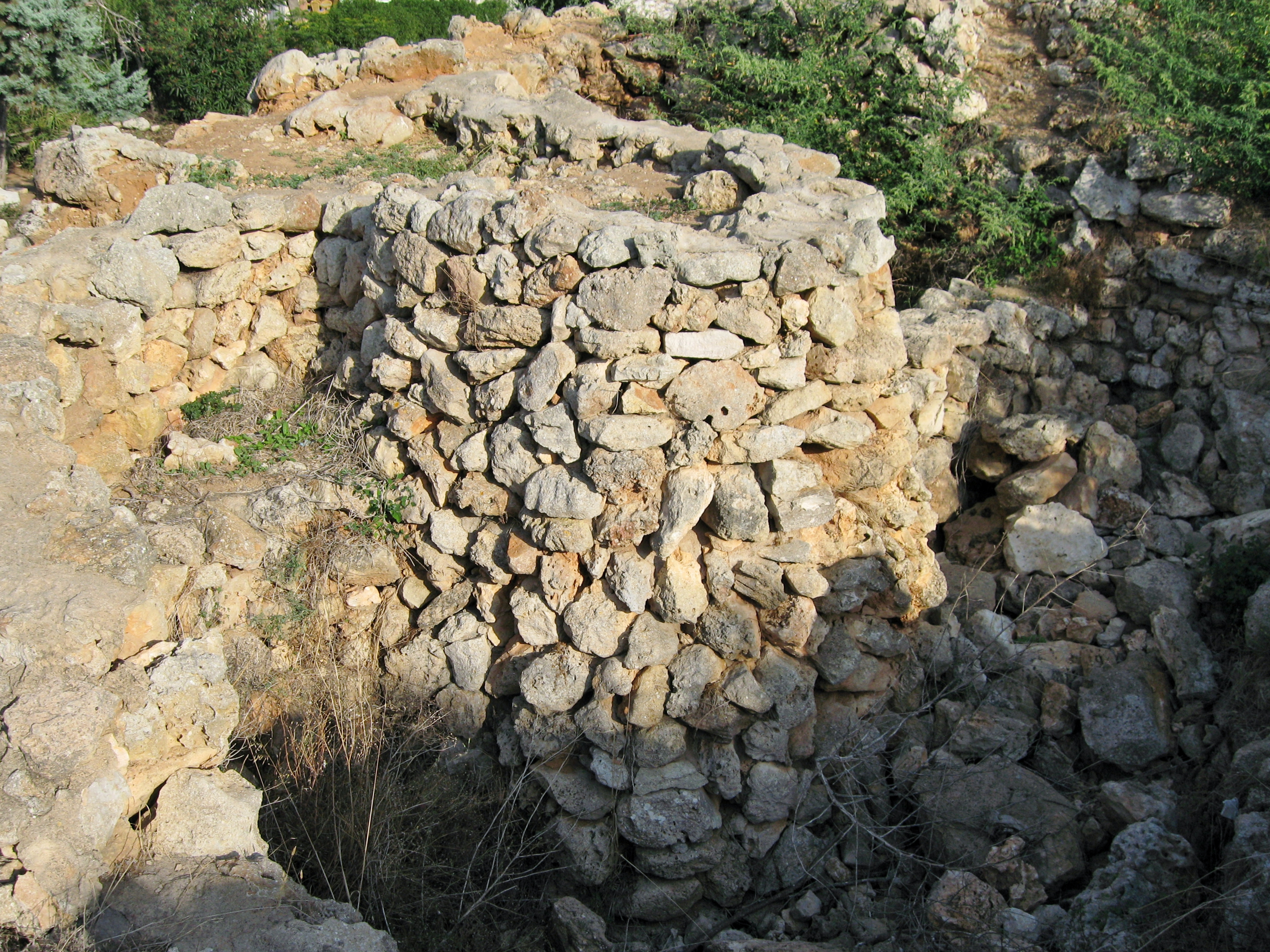 Poblat Talaiòtic de S'Illot, Sant Llorenç des Cardassar, Mallorca, Spain